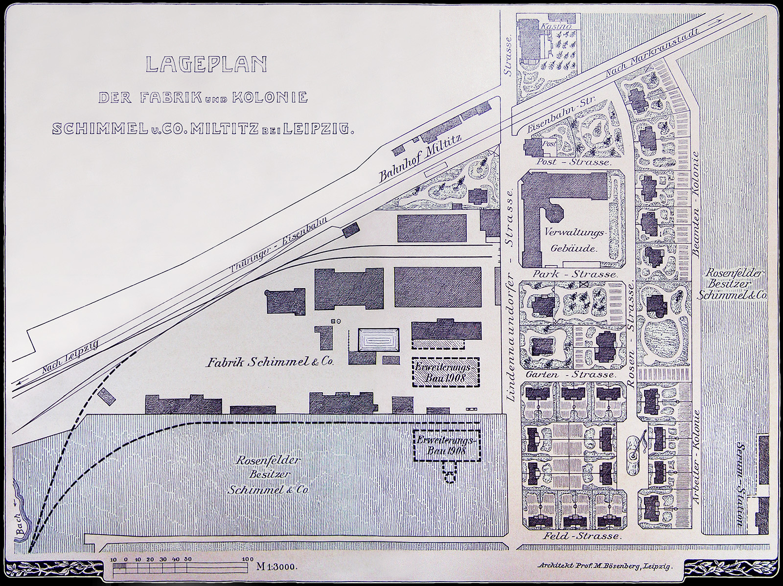 Lageplan der Chemischen Fabrik Schimmel & Co. in (Leipzig-) Miltitz mit Werksgelände, Plantagen, Verwaltungsgebäude, Kasino, Beamten- und Arbeiterwohnhäusern